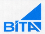 логотип ВІТА (телеканал)